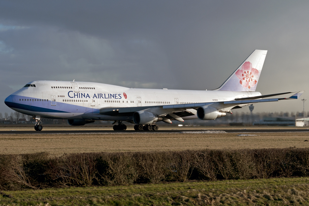 Boeing 747-409 Amsterdam schiphol [AMS / EHAM] 02-01-2011